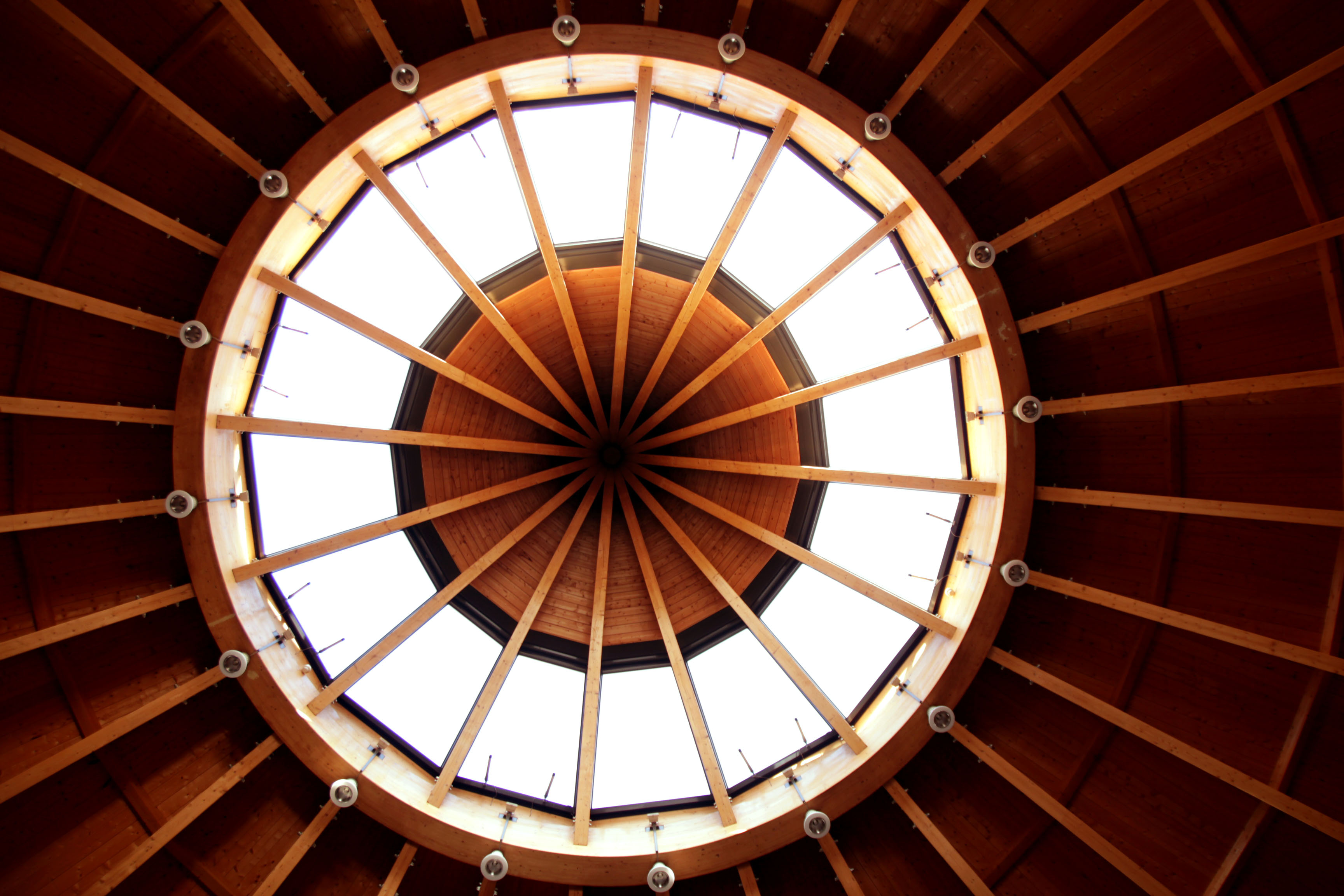 Blick in die Kuppel der Pilgerkirche (Schönstatt)